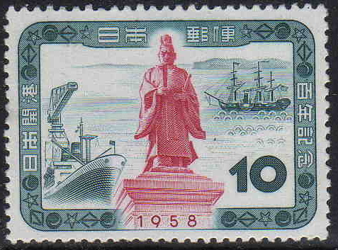 日本海溝00周年記念切手。中央に描かれているのは江戸幕府大老であった井伊直弼の銅像である。